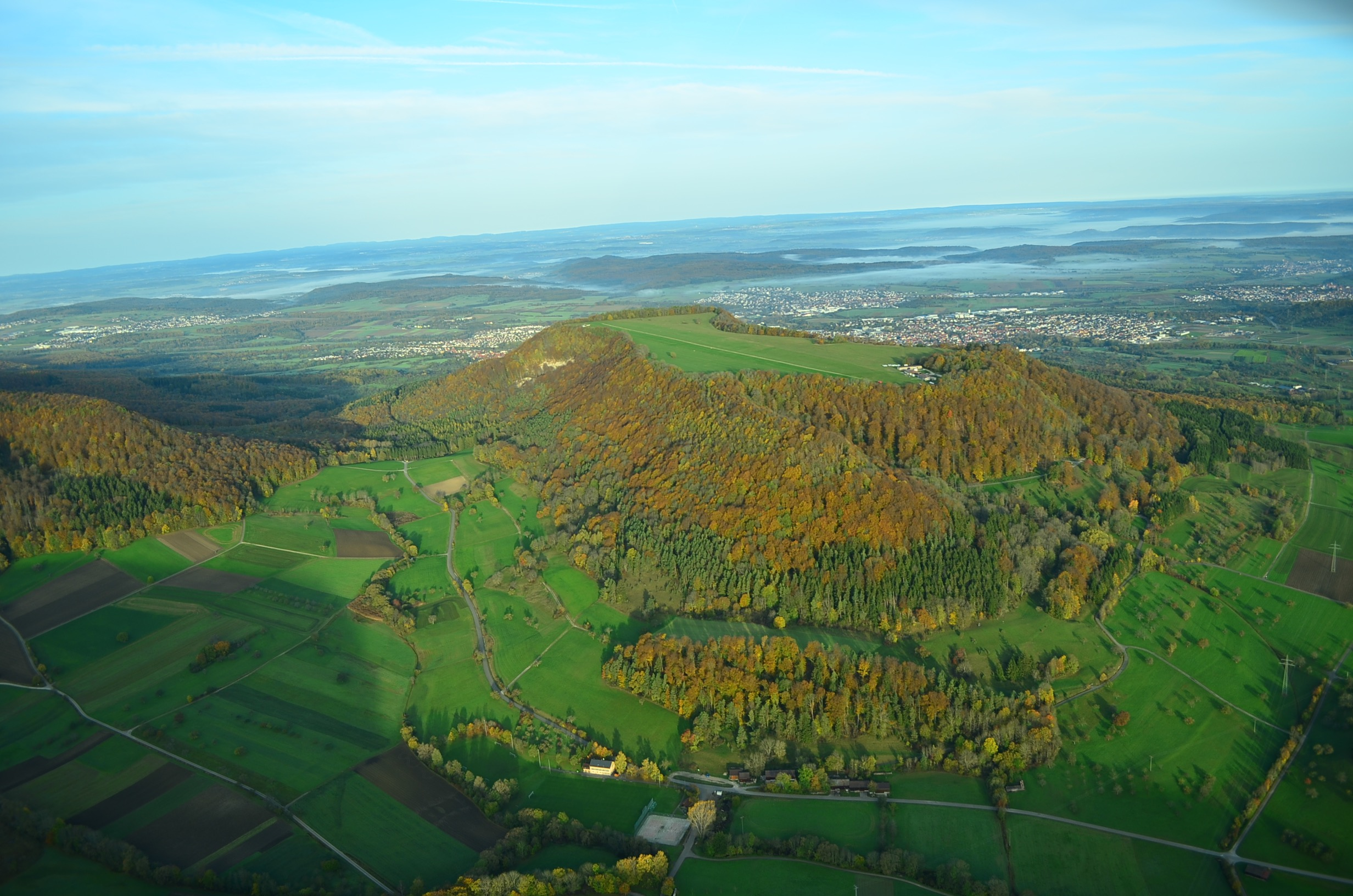 Auf dem Bild ist der Farrenberg zu sehen. Das Bild wurde aus einem Segelflugzeug vom FSV Mössingen gemacht.